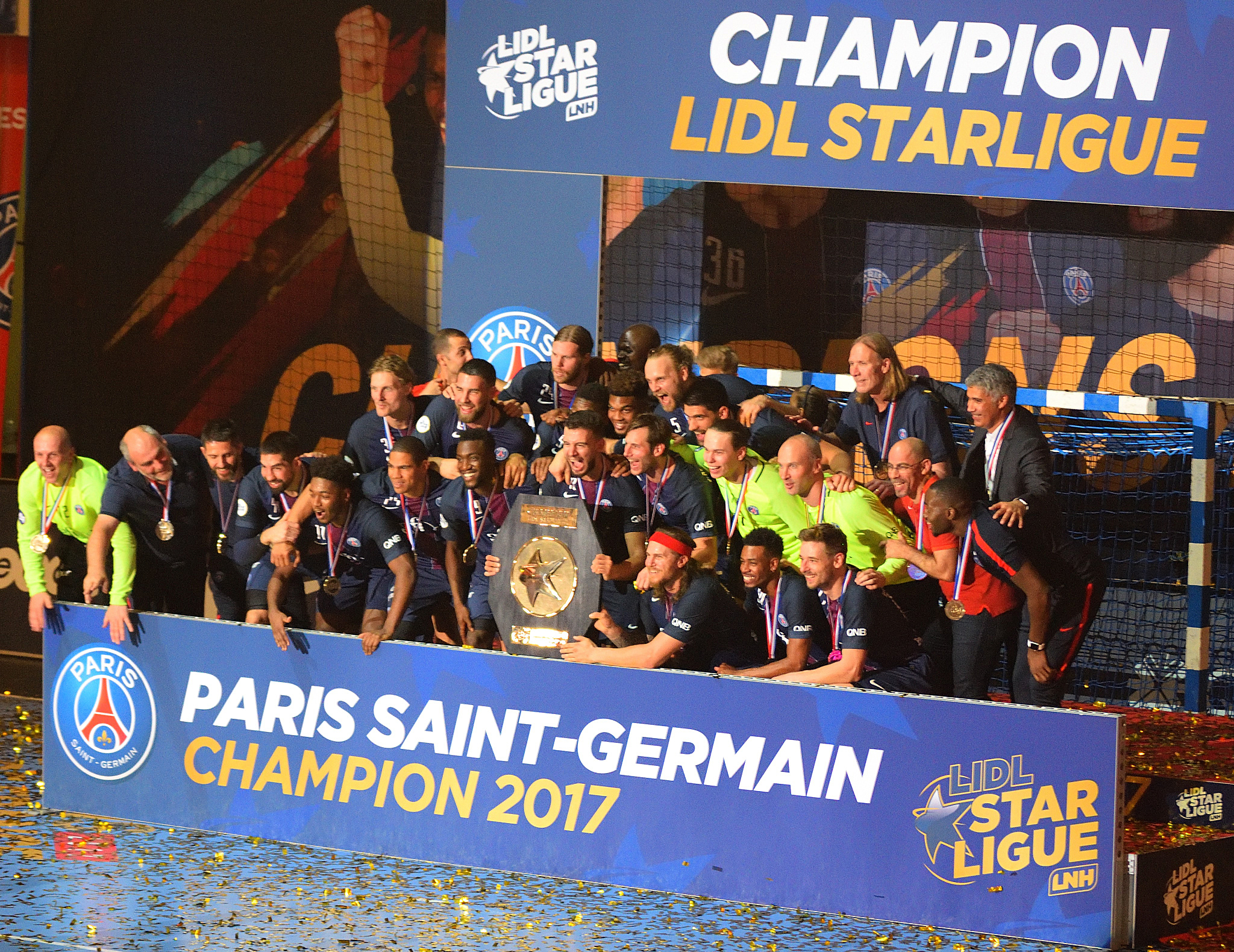 Dernier match du championnat de LidlStarLigue entre le PSG et le HBC Nantes. A Coubertin, le 8 juin 2017.